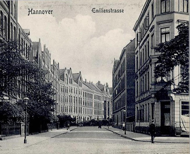 Bildseite der Ansichtskarte Nummer 1193 aus dem Verlag von Friedrich Astholz junior mit einem Blick durch die 1885 in Hannover angelegte „Emilienstraße“